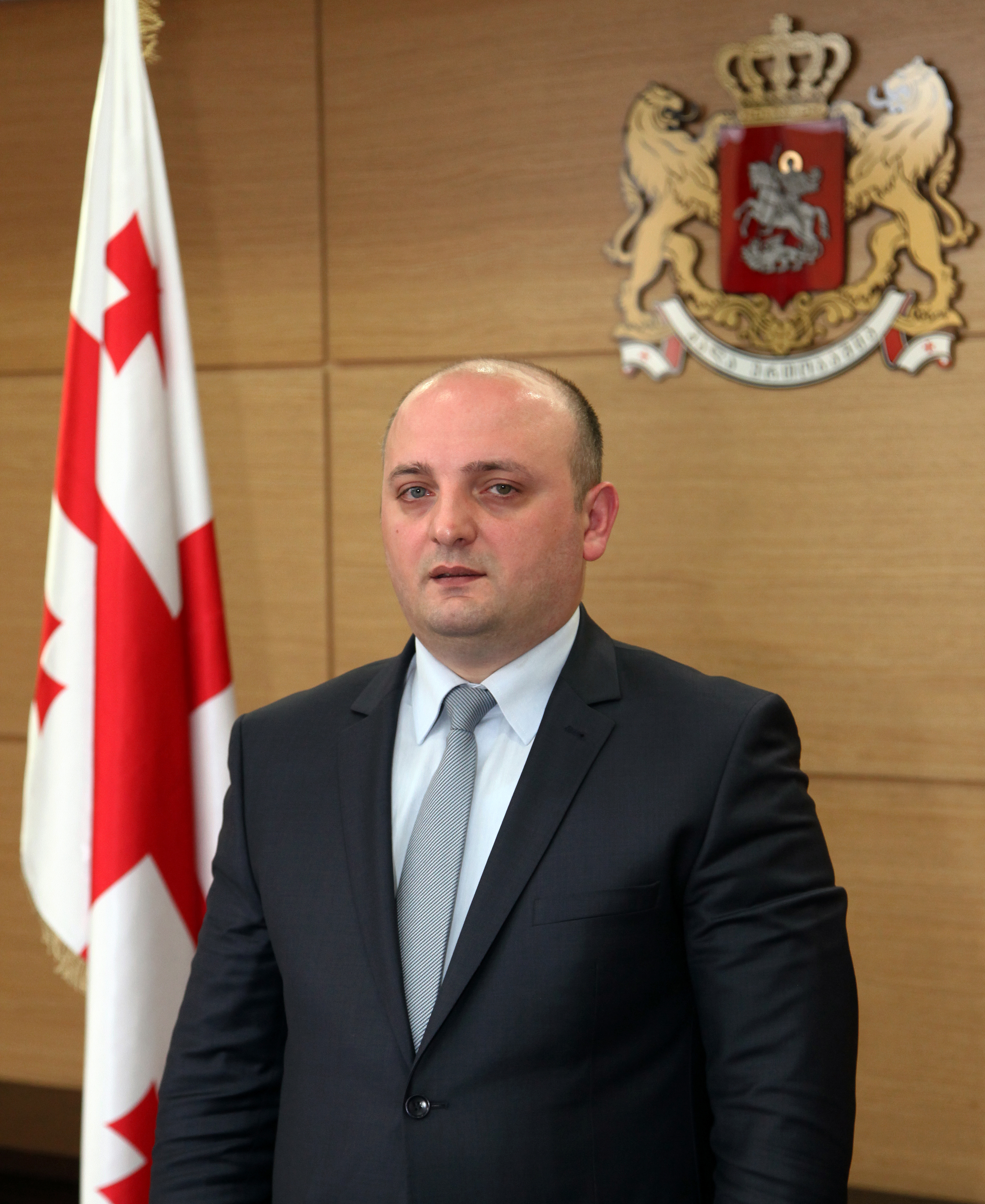 მინდია ჯანელიძე საქართველოს თავდაცვის მინისტრი 4 ნოემბერი, 2014 – 1 მაისი, 2015